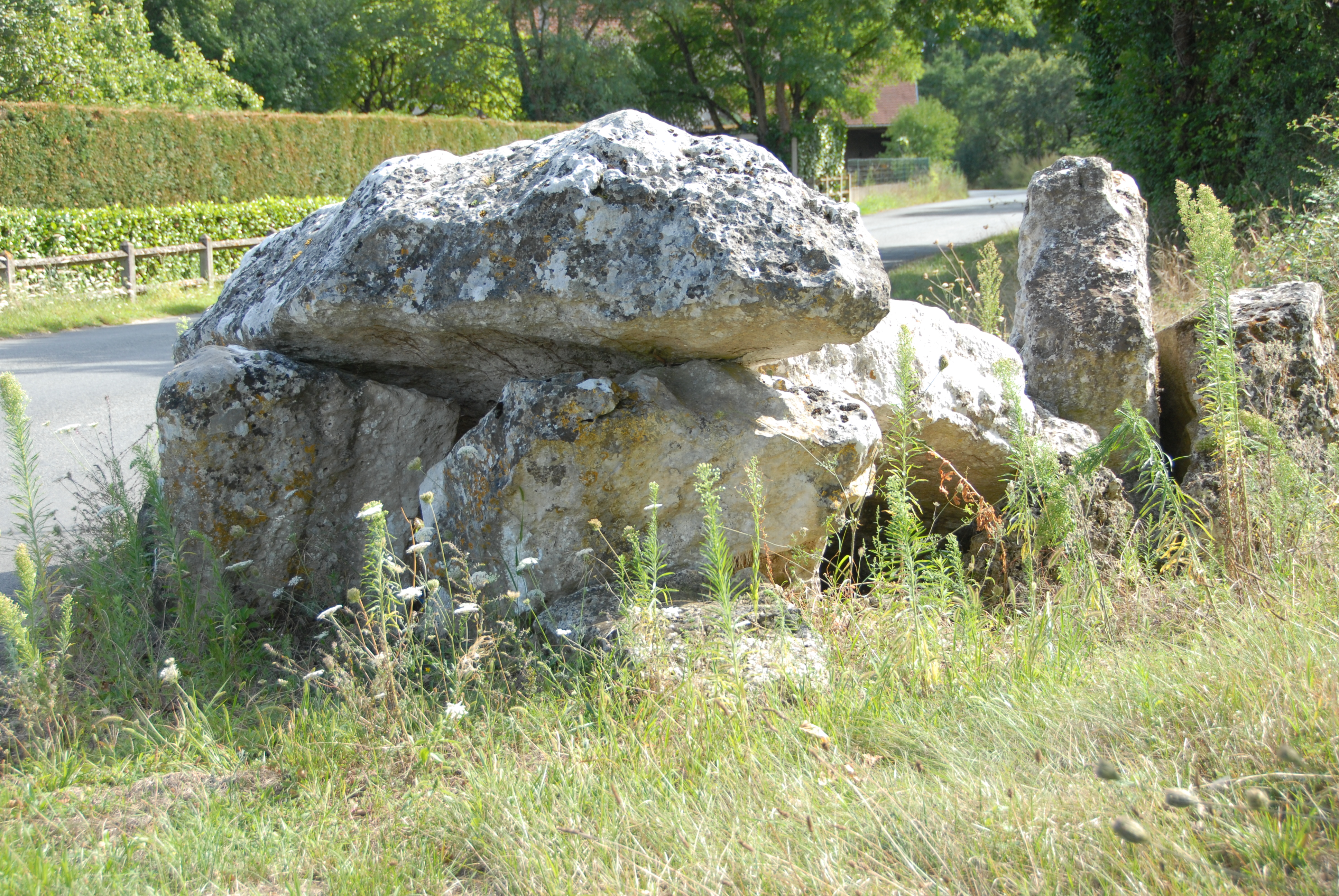 Civaux, Dolmen